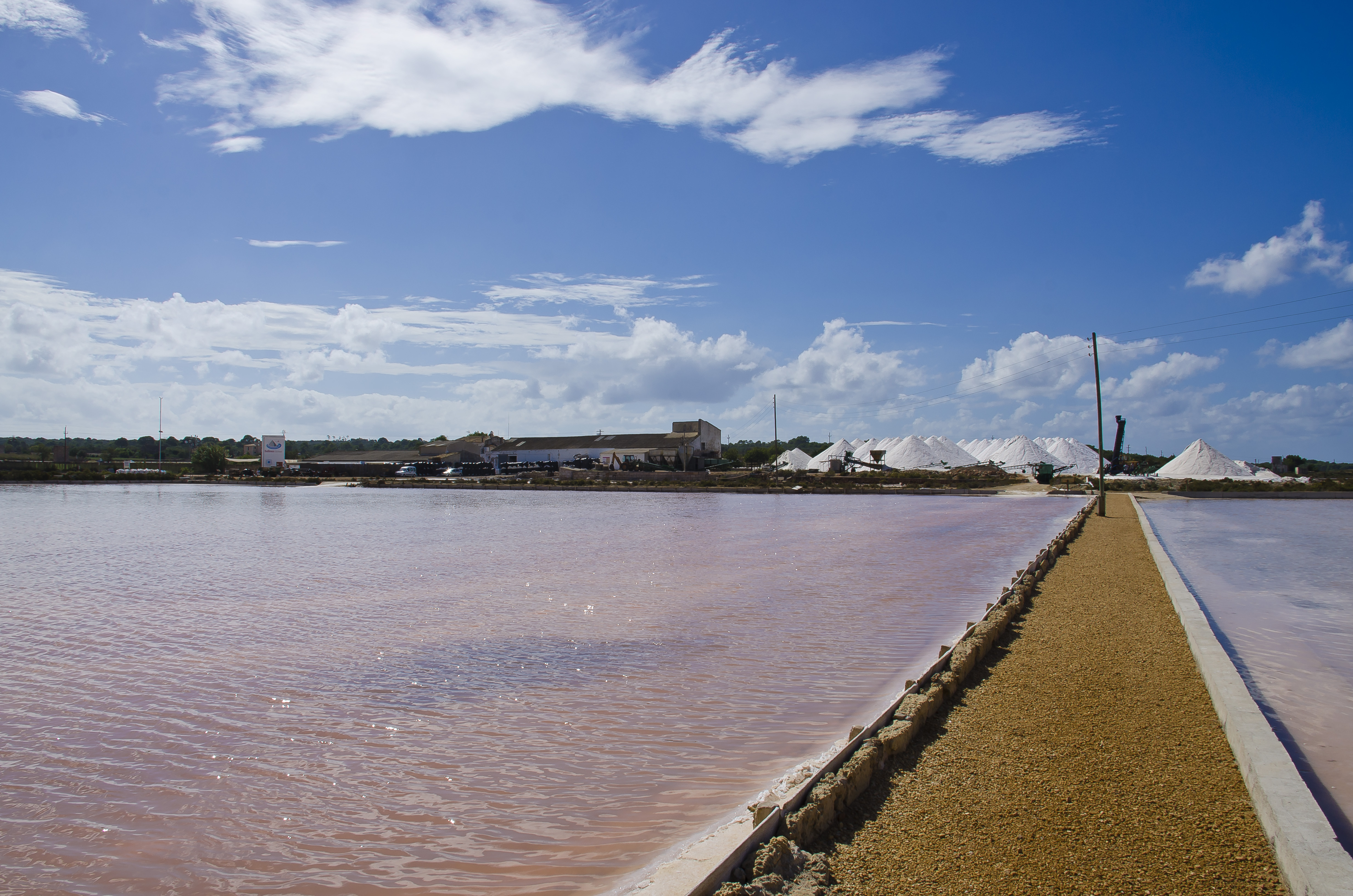 Salines d'Es Trenc, Mallorca